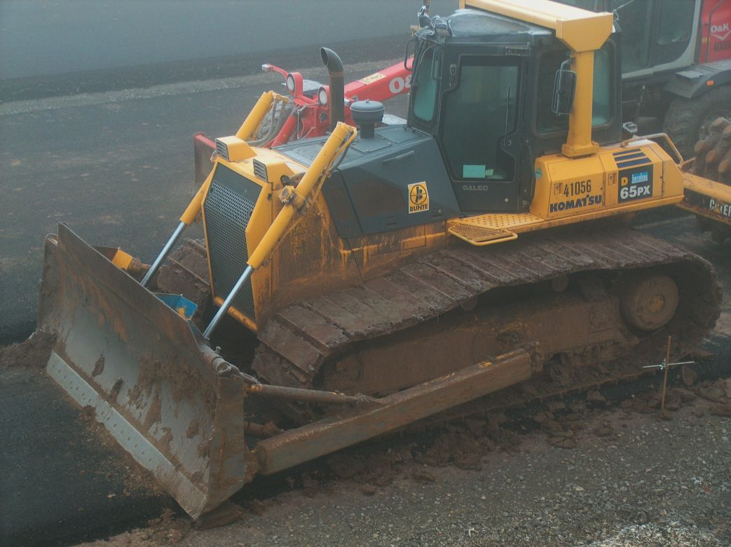 Komatsu 65PX Planierraupe